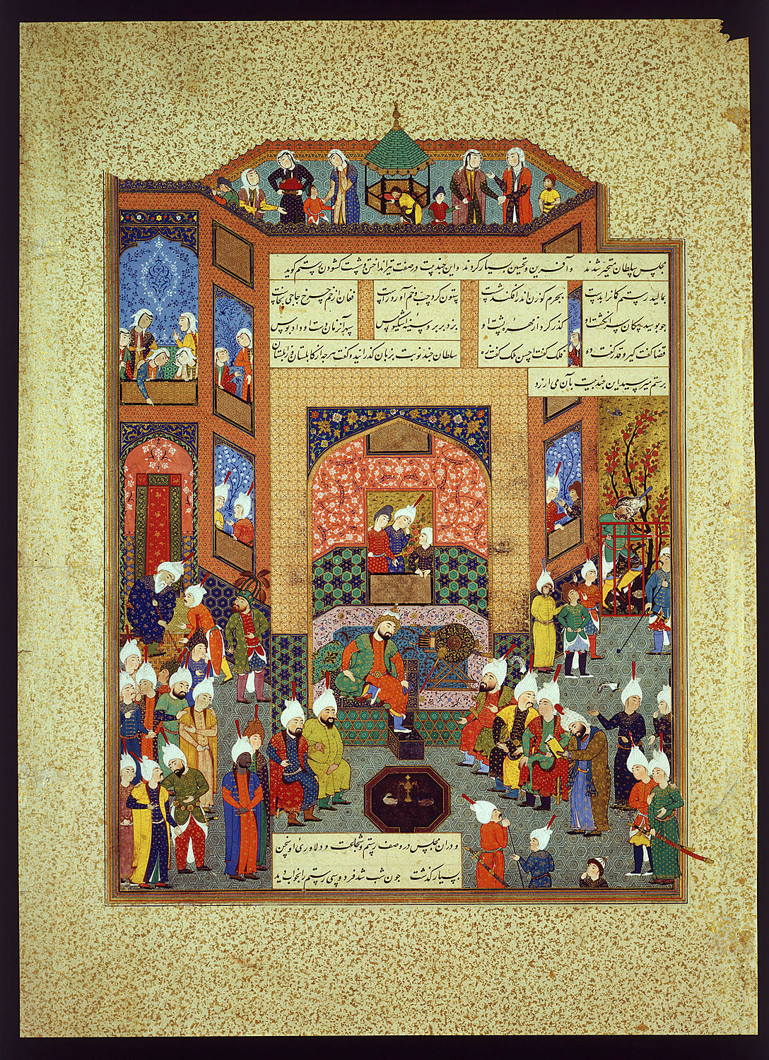 Sultan Mahmud von Ghazna empfängt den Dichter Ferdausi. Aus: "Schahname für Schah Tahmasp"